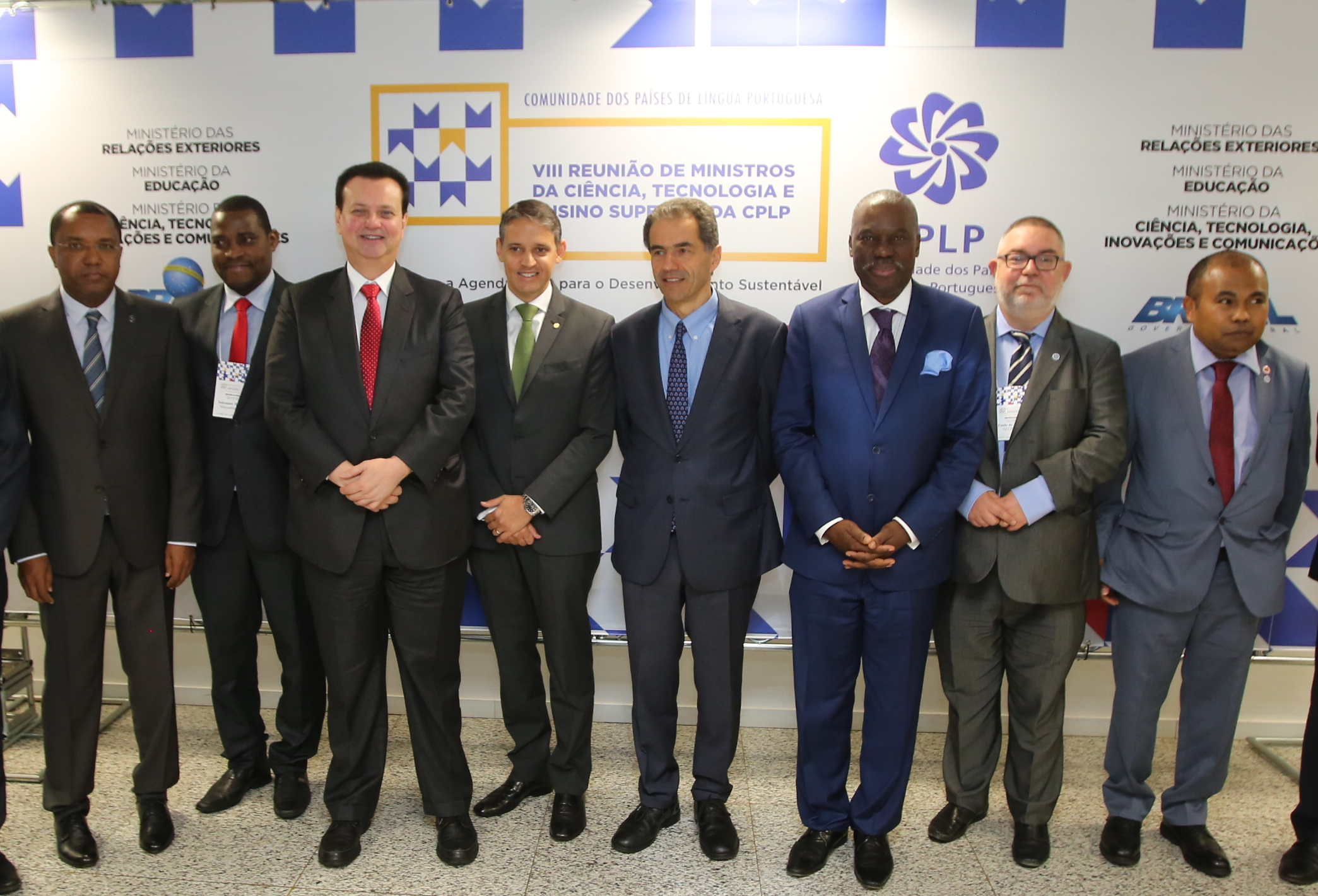 VIII Reunião de Ministros de Ciência, Tecnologia e Ensino Superior da Comunidade de Países de Língua Portuguesa (CPLP). Foto Ricardo Fonseca